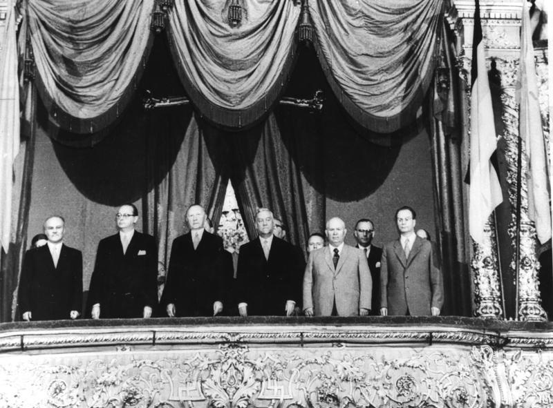 Regierungsdelegation der Deutschen Bundesrepublik wohnte am 10. September 1955 der Ballettaufführung "Romeo und Julia" von S. Prokofjew im Großen Theater der UdSSR in Moskau bei. Blick in die Loge während der Intonierung der Staatshymnen. (Vorn, von rechts): M. G. Perwuchin, Erster Stellvertreter des Vorsitzenden des Ministerrates der UdSSR; N. S. Chruschtschow, Mitglied des Präsidiums des Obersten Sowjets der UdSSR; N. A. Bulganin, Vorsitzender des Ministerrates der UdSSR; der westdeutsche Bundeskanzler Dr. Konrad Adenauer, der westdeutsche Außenminister von Brentano; W. M. Molotow, Minister für Auswärtige Angelegenheiten der UdSSR.